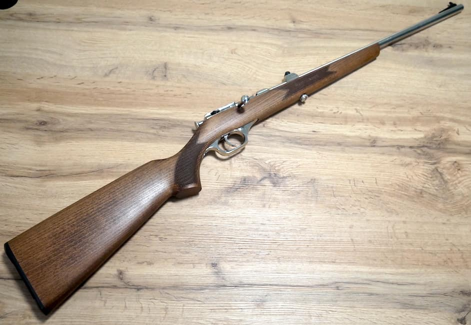 Flobertová puška Spielberg Brno, 200F, ráže 6mm, buková rytina